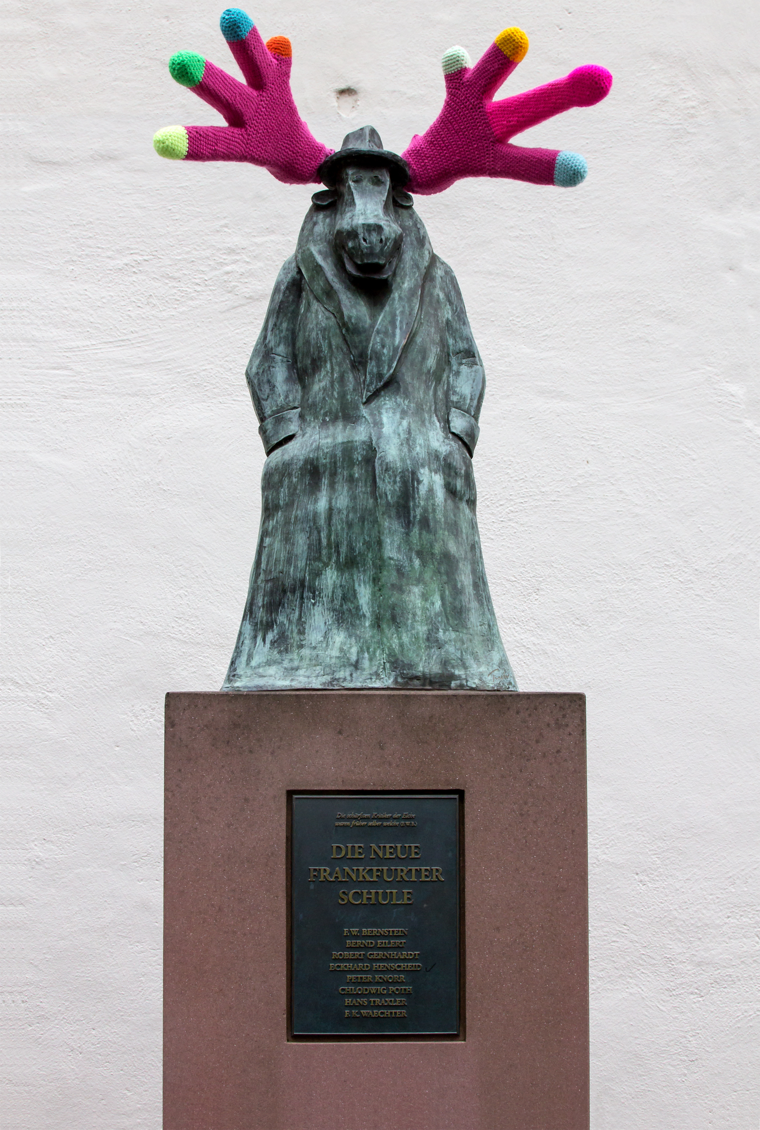 „Die schärfsten Kritiker der Elche / waren früher selber welche“ Skulptur von Hans Traxler vor dem Museum für komische Kunst, Frankfurt am Main Die Statue wurde von der Guerilla-Strickerin Mata Haarig mit einem Überzug für das Geweih verändert